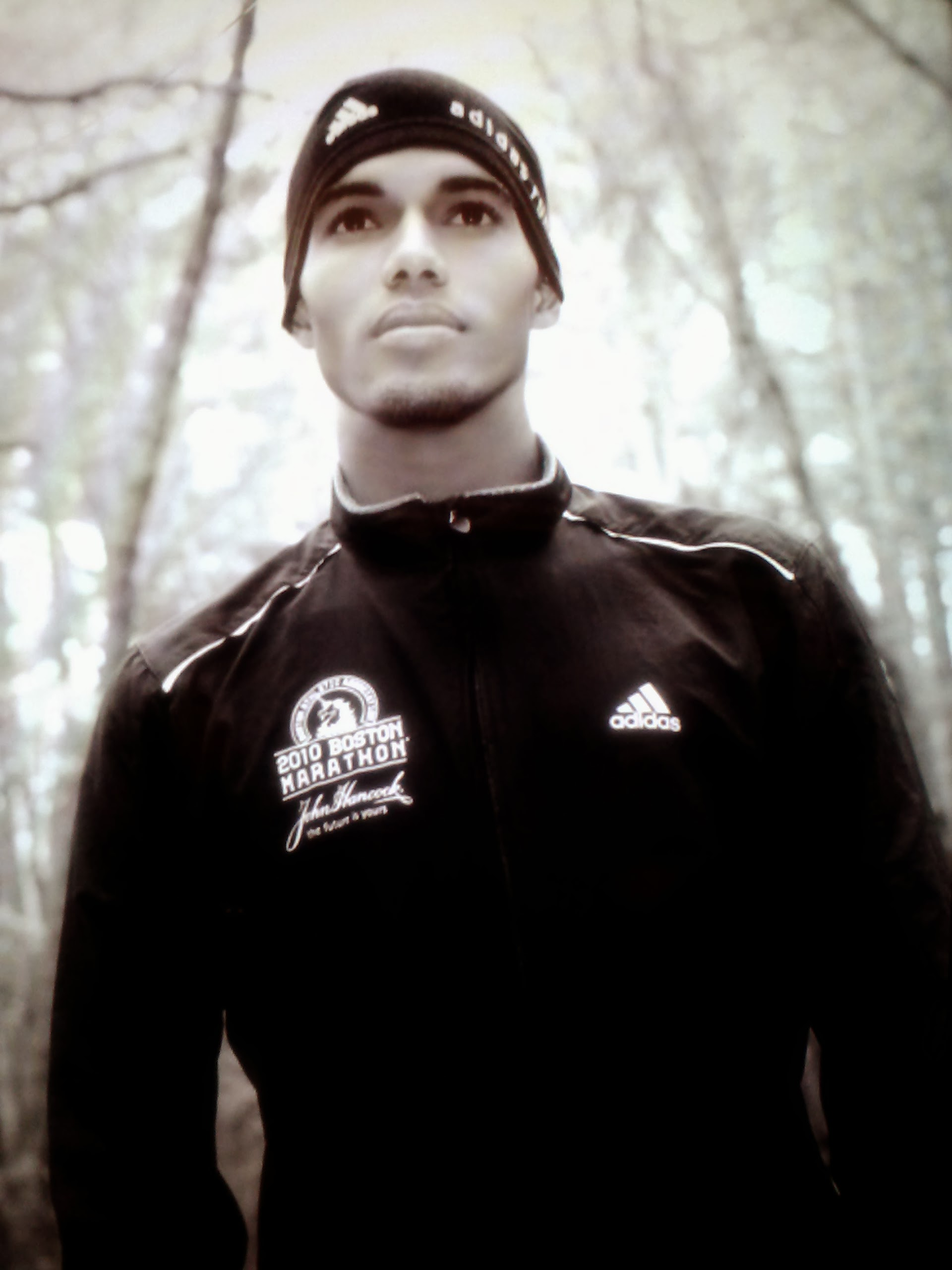 Picture of Ruben Sança